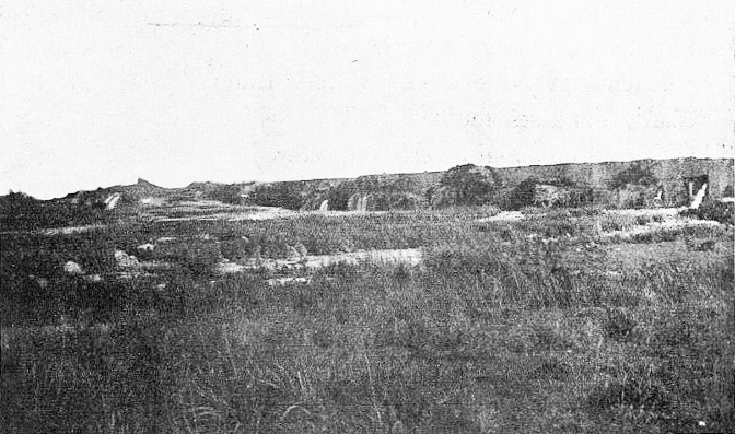 La digue du lac de Homs